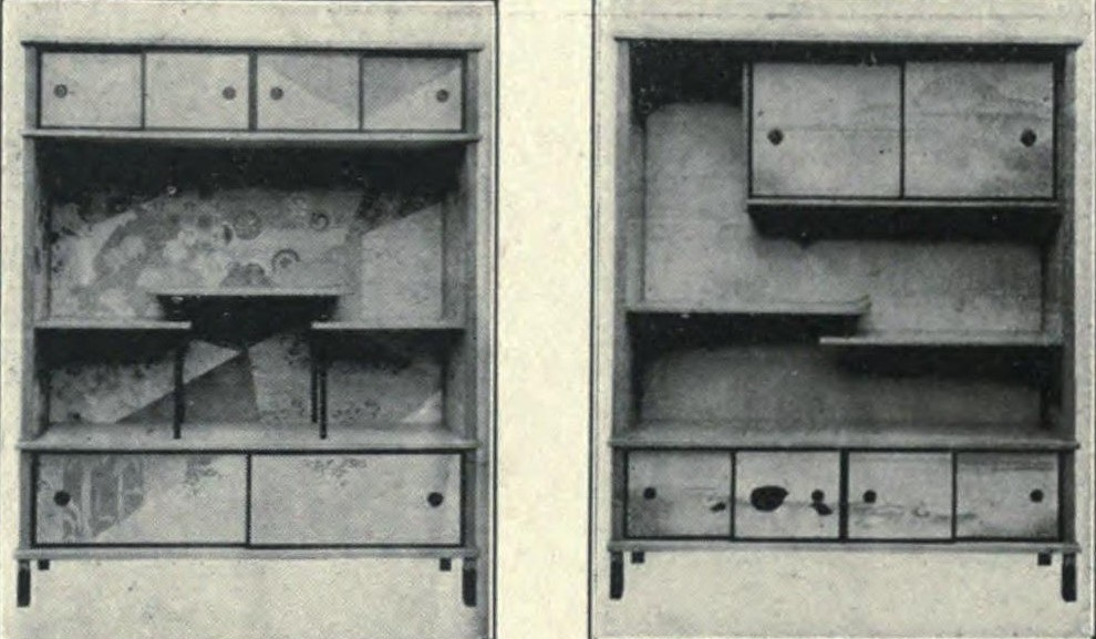 榛原 紙製品